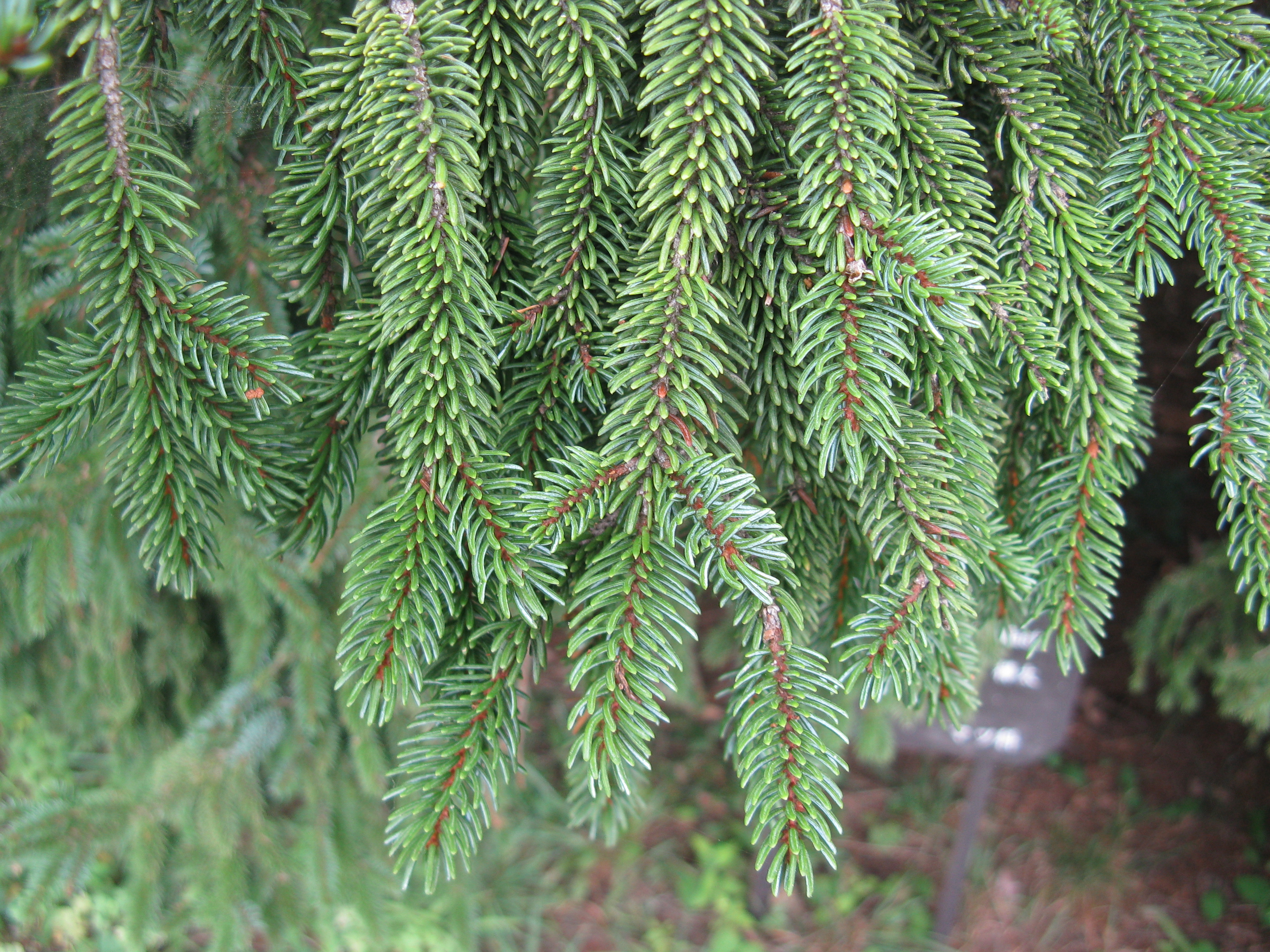 Scientific name Picea glehnii